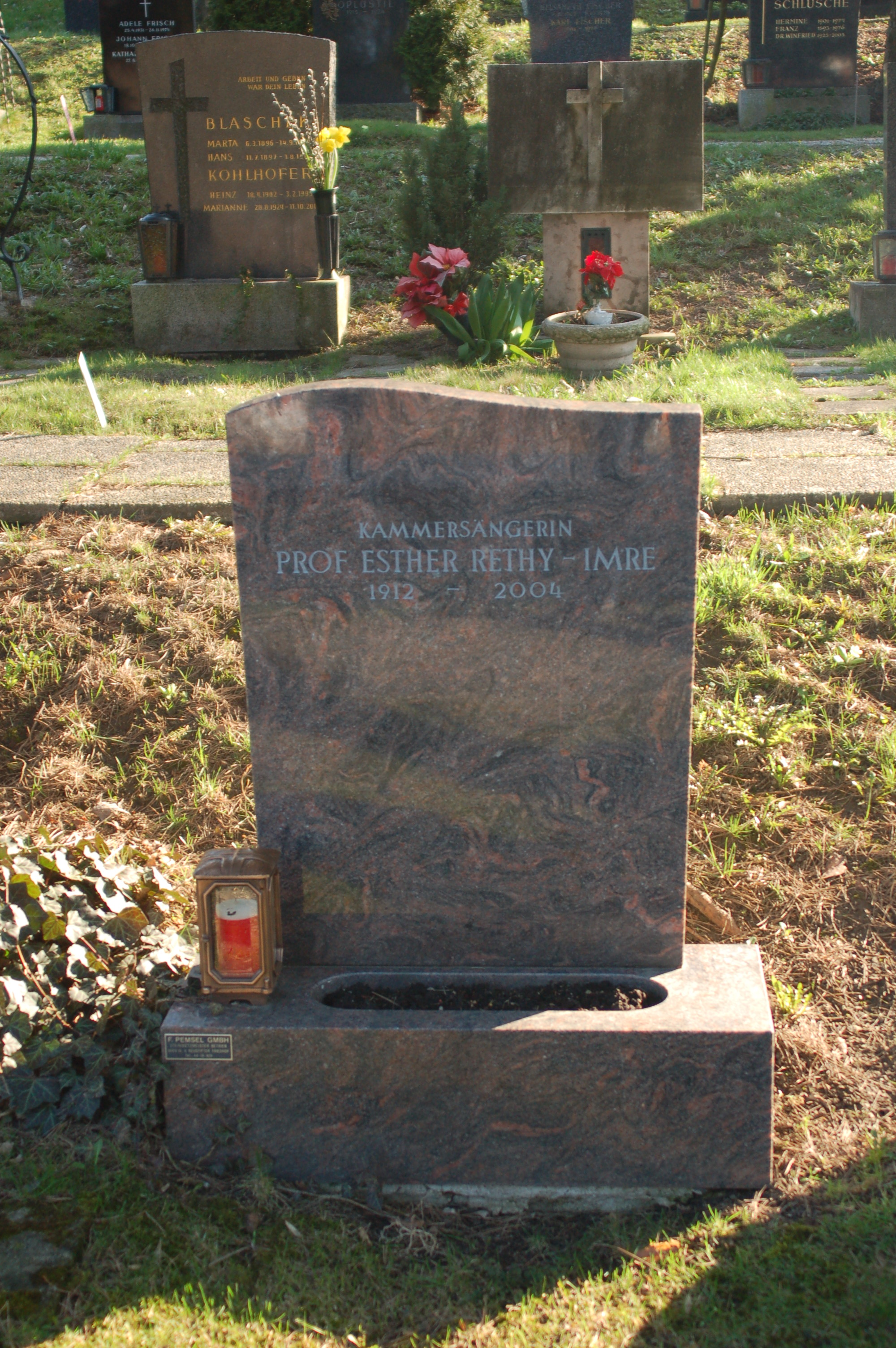 Neustifter Friedhof, Grabstätte von Ester Rethy (Ehrengrab der Stadt Wien)